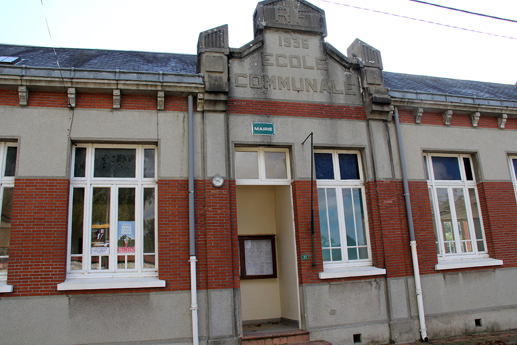 Tigny-Noyelle ( Pas-de-Calais), France, ancienne école devenue mairie.